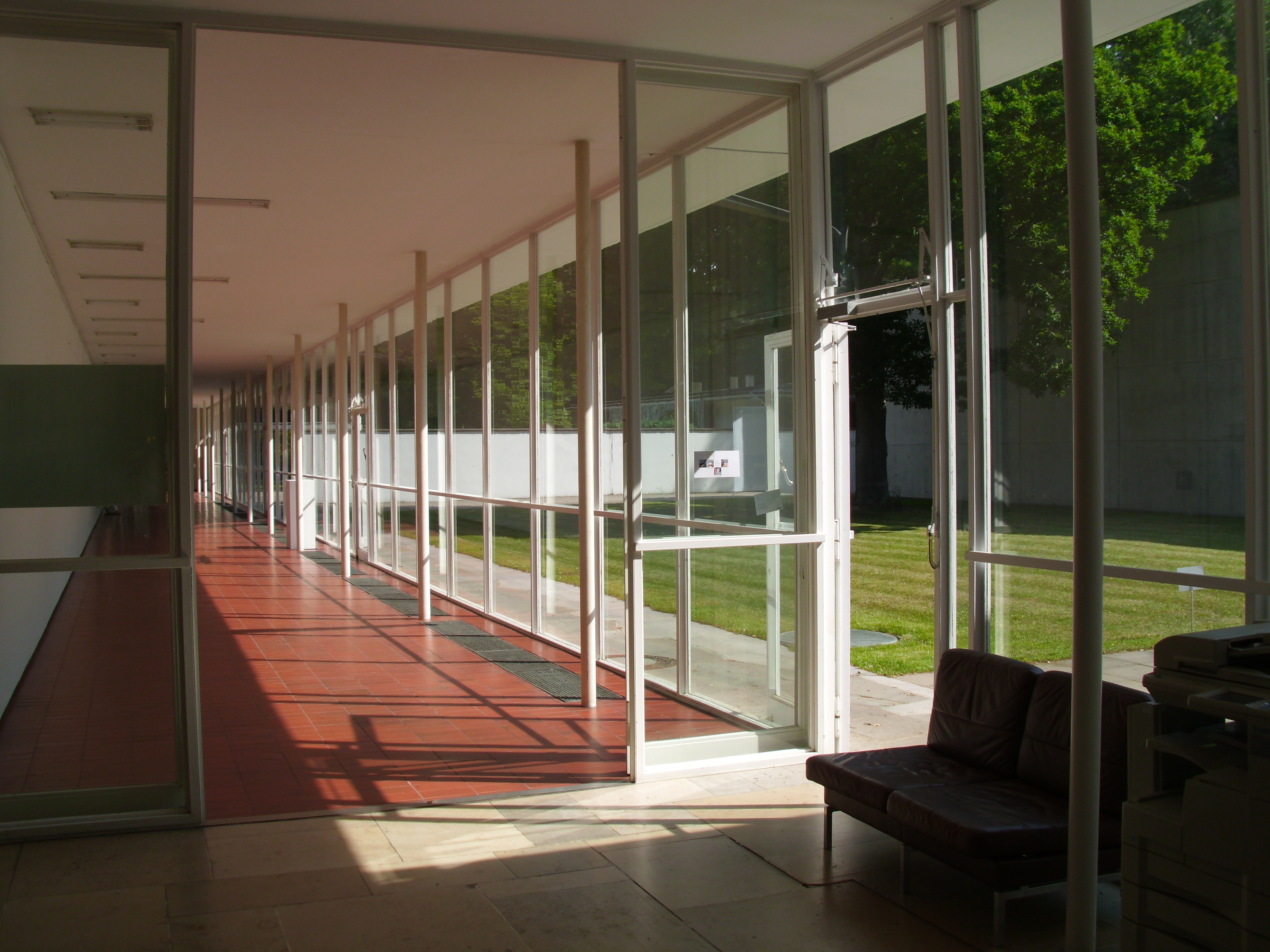 Langer Gang